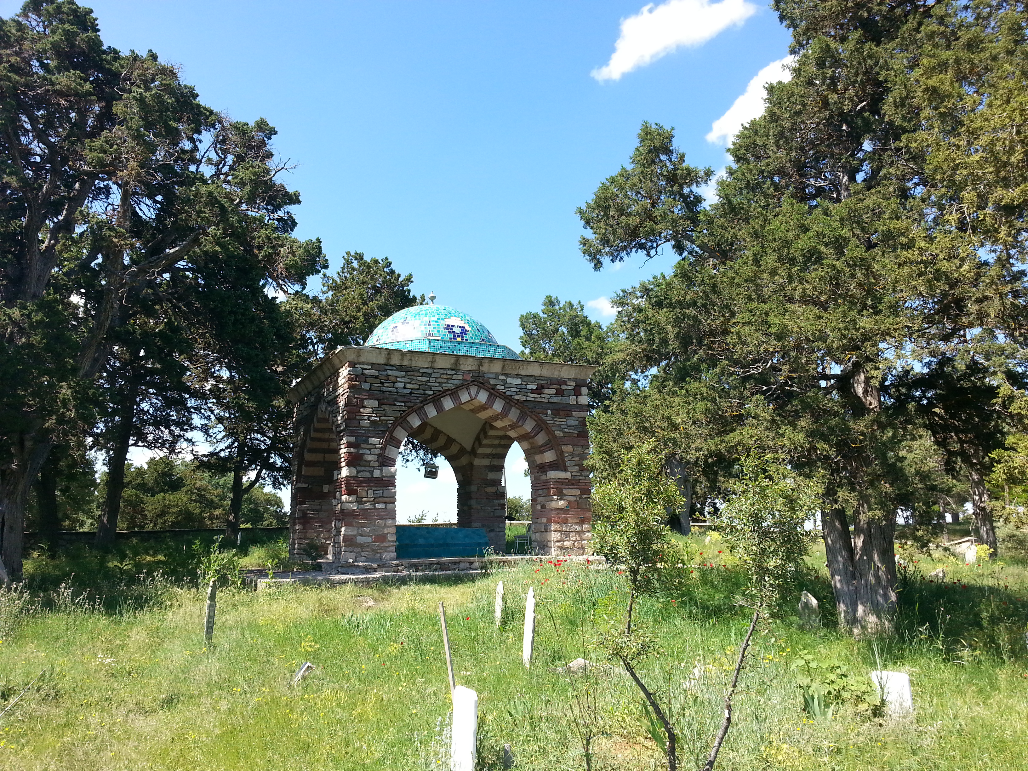 anasultan türbesi kütahya